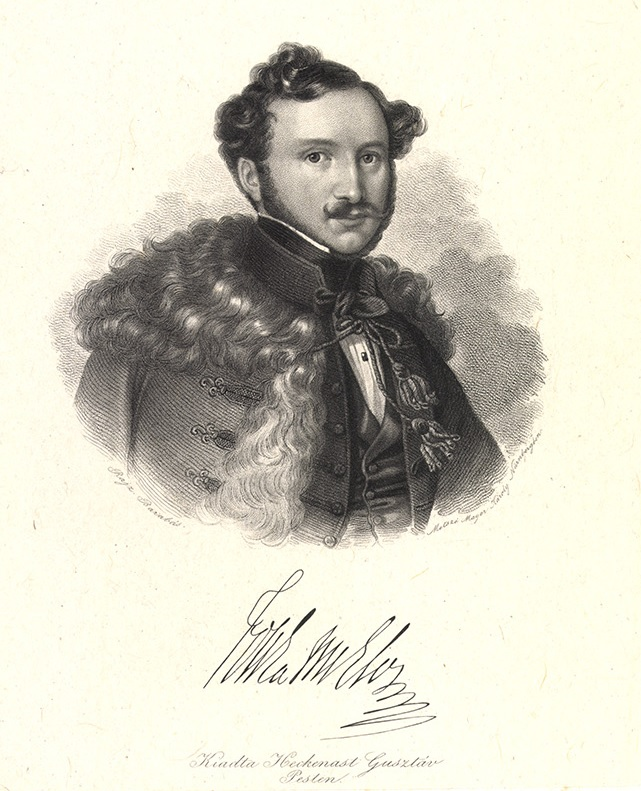 Jósika Miklós, branyicskai báró (Torda, 1794. április 28. – Drezda, 1865. február 27.) író, újságíró, a magyar romantikus regény megteremtője.